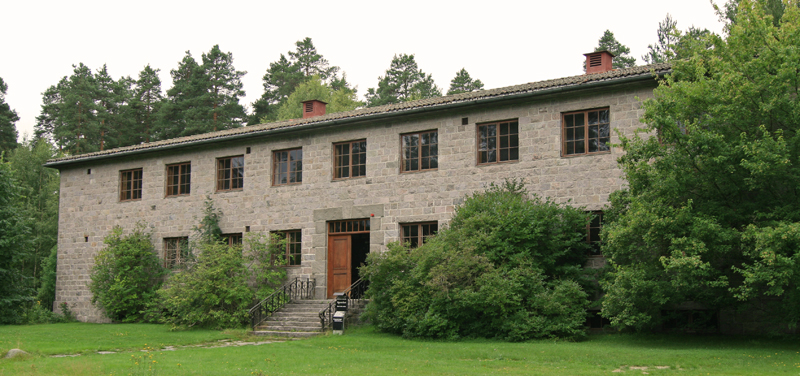 Glomdalsmuseets første utstillingsbygning, bygd 1939 av lokal granitt. Arkitekt: Simen Øien.